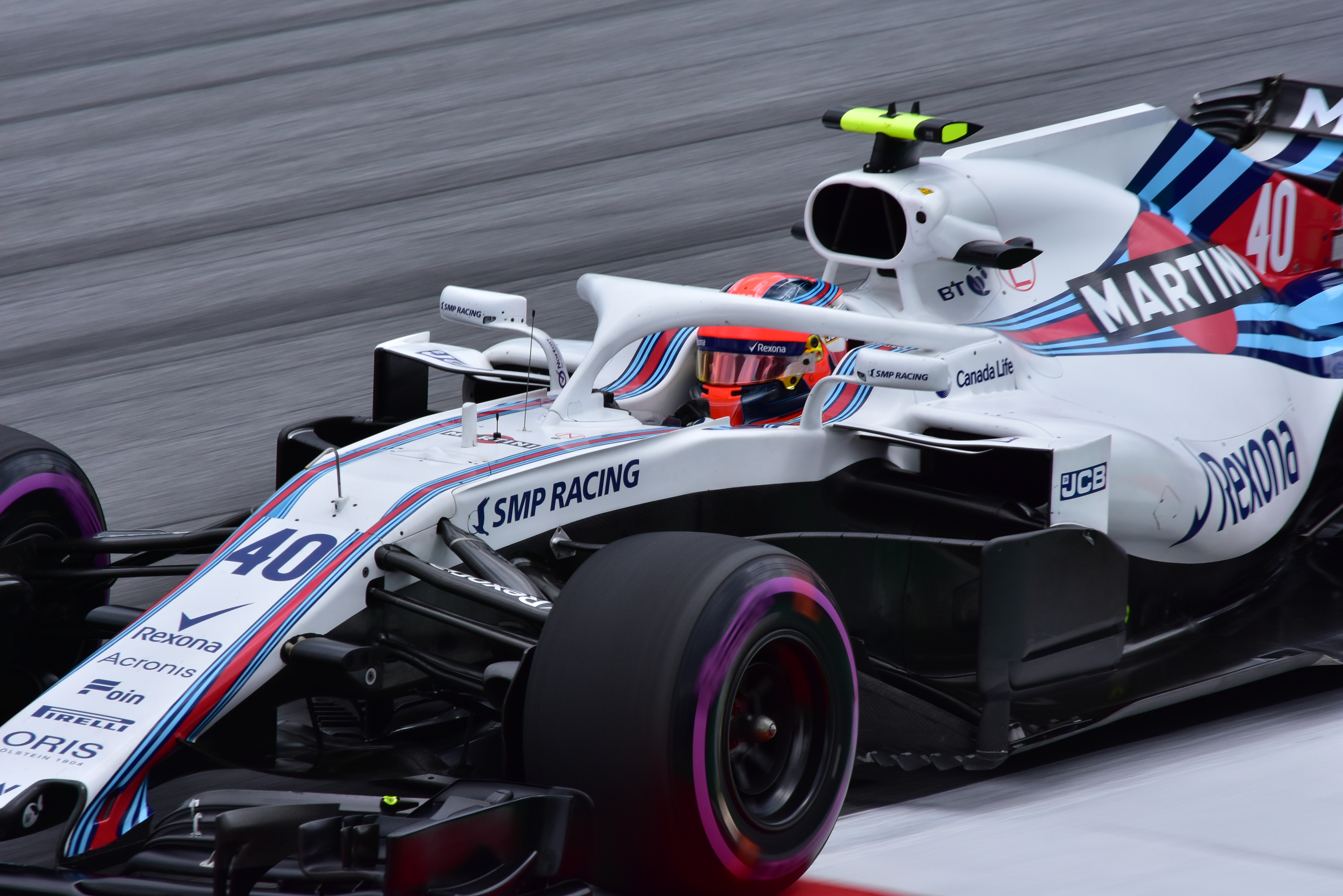 2018 Austrian Grand Prix.